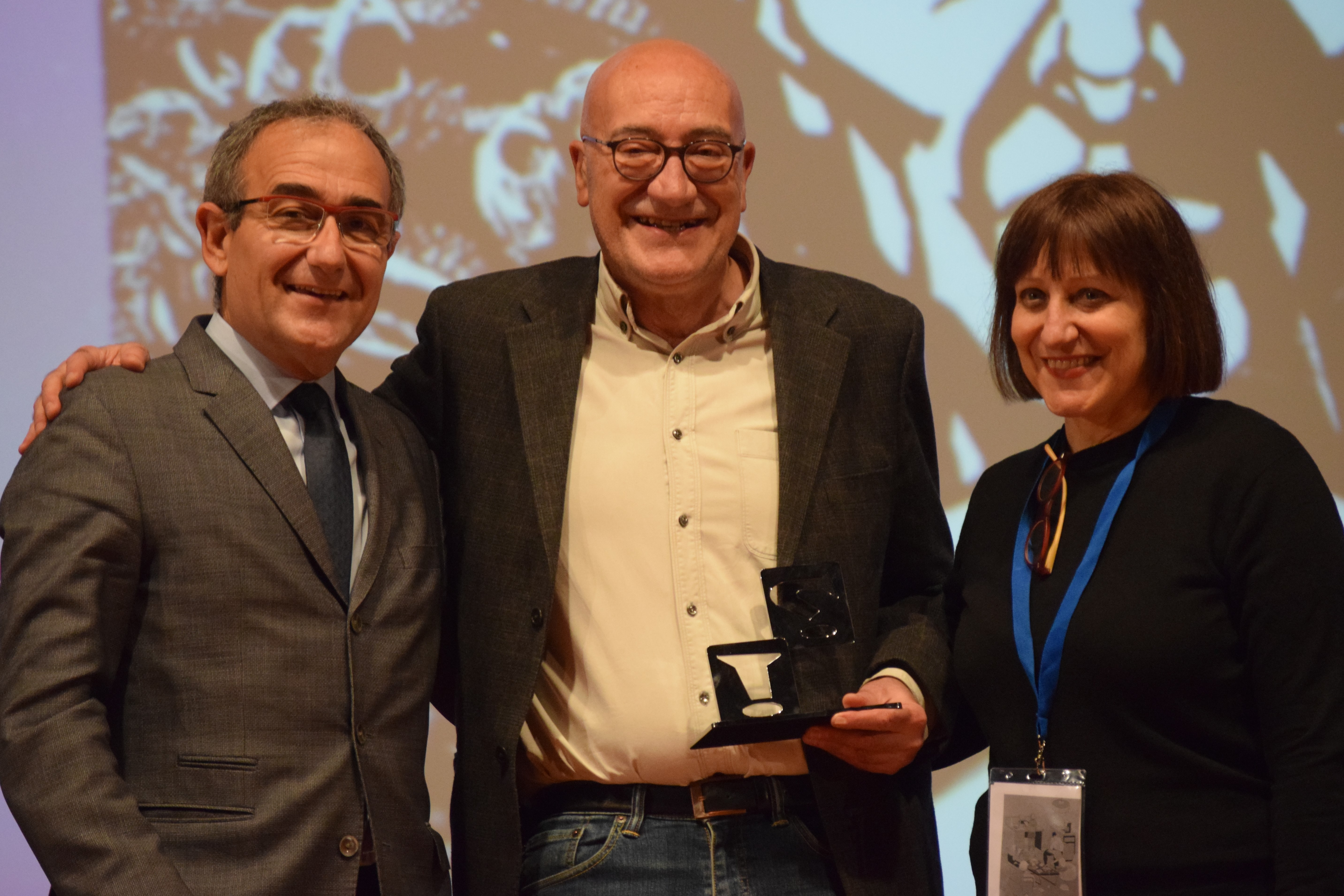 El guionista Antonio Altarriba durant la cerimònia d'entrega dels premis del 37. Còmic Barcelona. Altarriba, acompanyat de Patrici Tixis i Laura Pérez Bernetti, acaba de ser guardonat amb el Gran Premi del Saló. 37 Còmic Barcelona, 2019